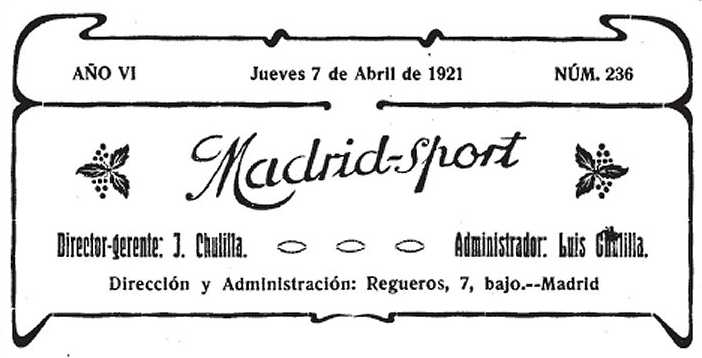 Madrid Sport - Director-gerente: J. Chulilla. Administrador: Luis Chulilla - Direccion y Administracion: Regueros, 7, bajo.-- Madrid